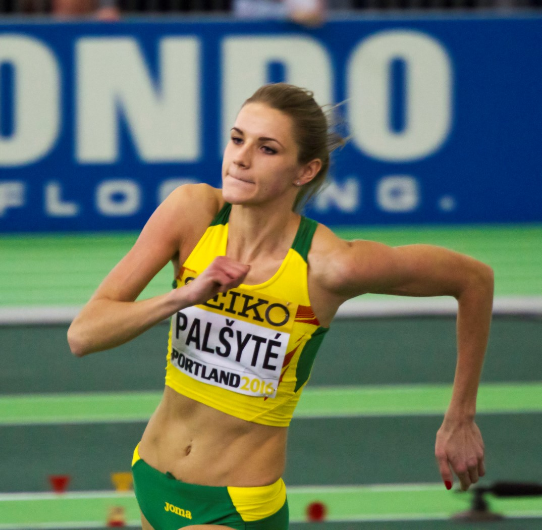 5091 palsyte